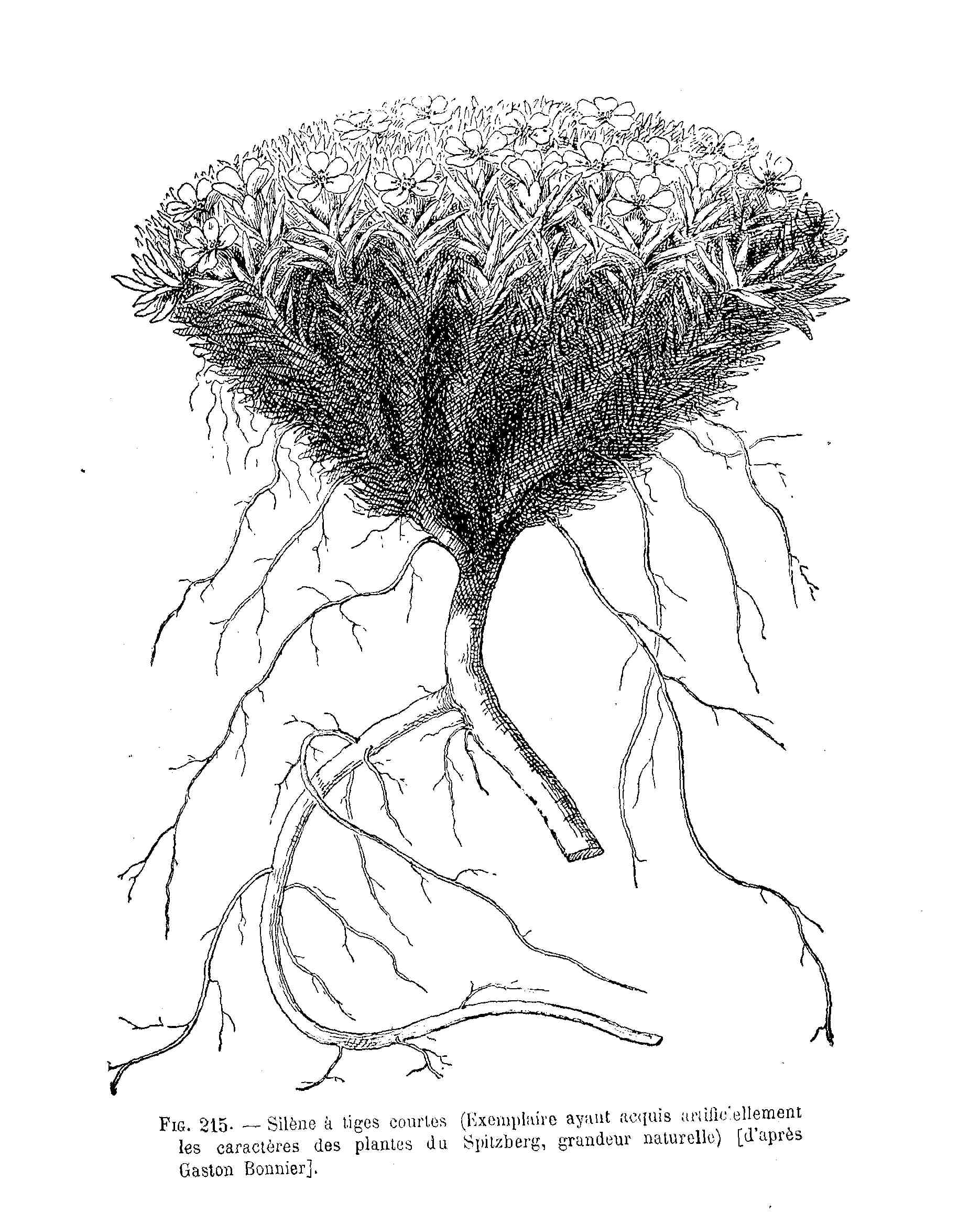 Silene acaulis (dessin)